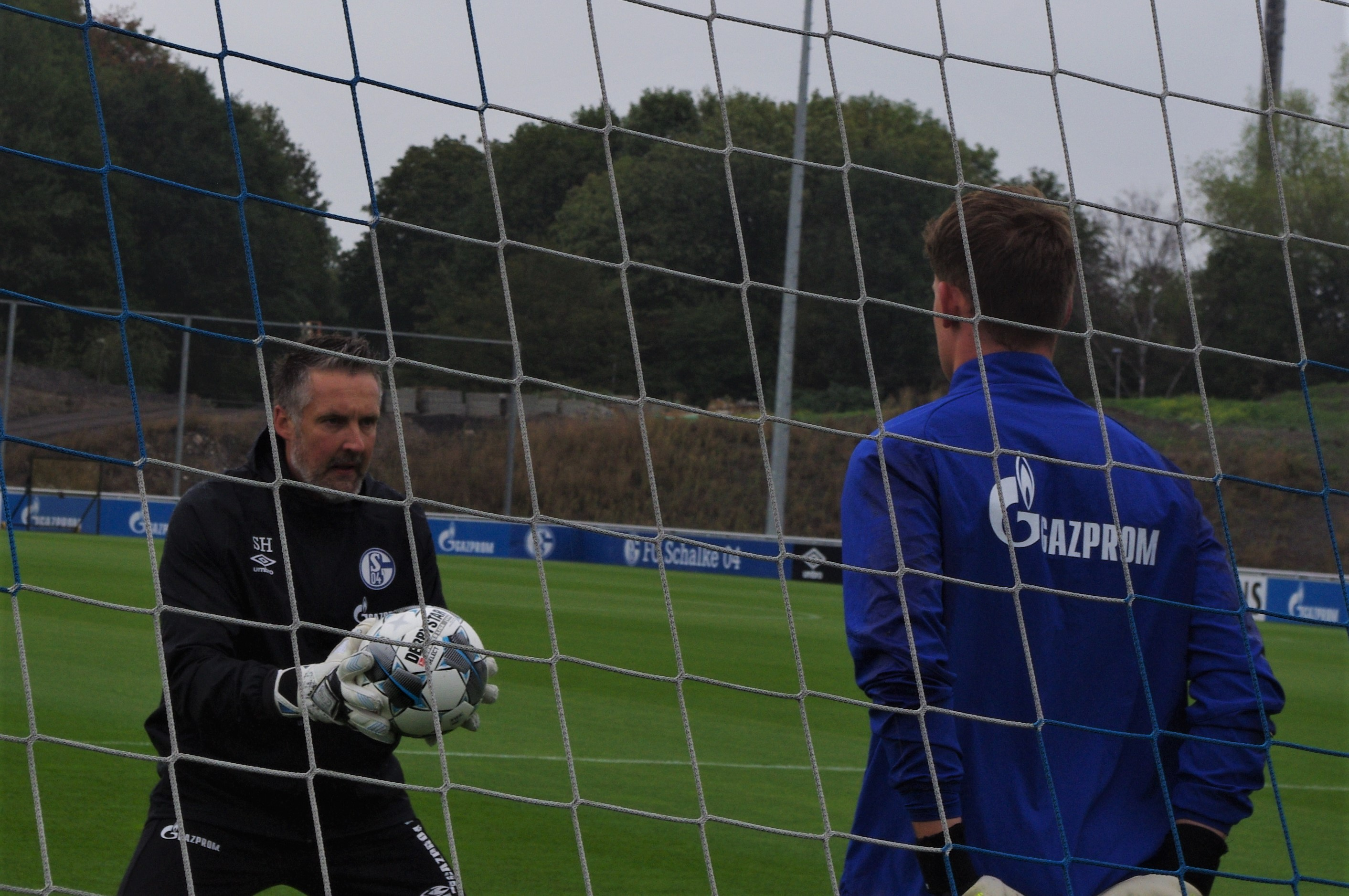 Simon Henzler beim Torwarttraining mit Alexander Nübel